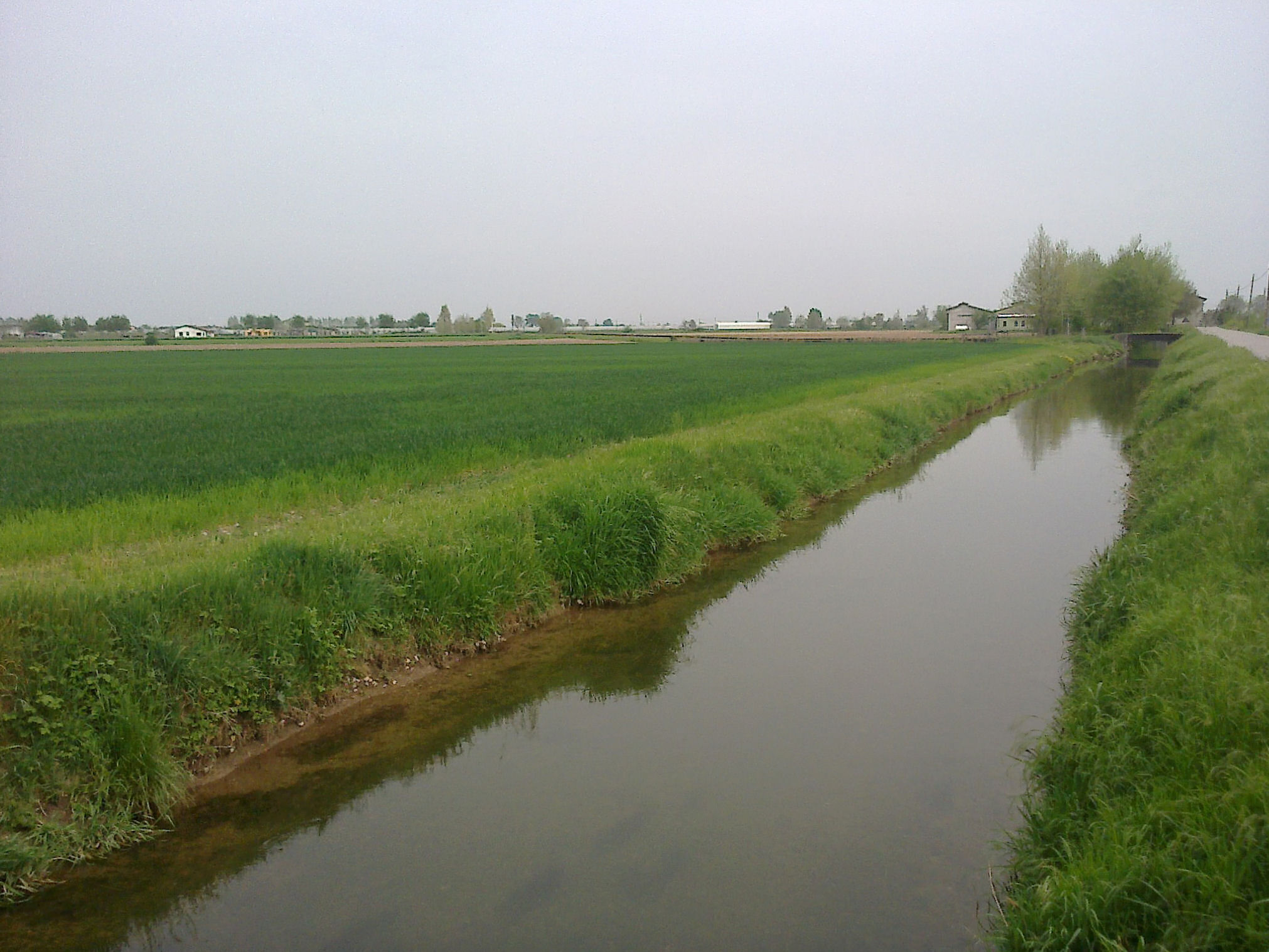 Medole, il torrente Seriola Marchionale.